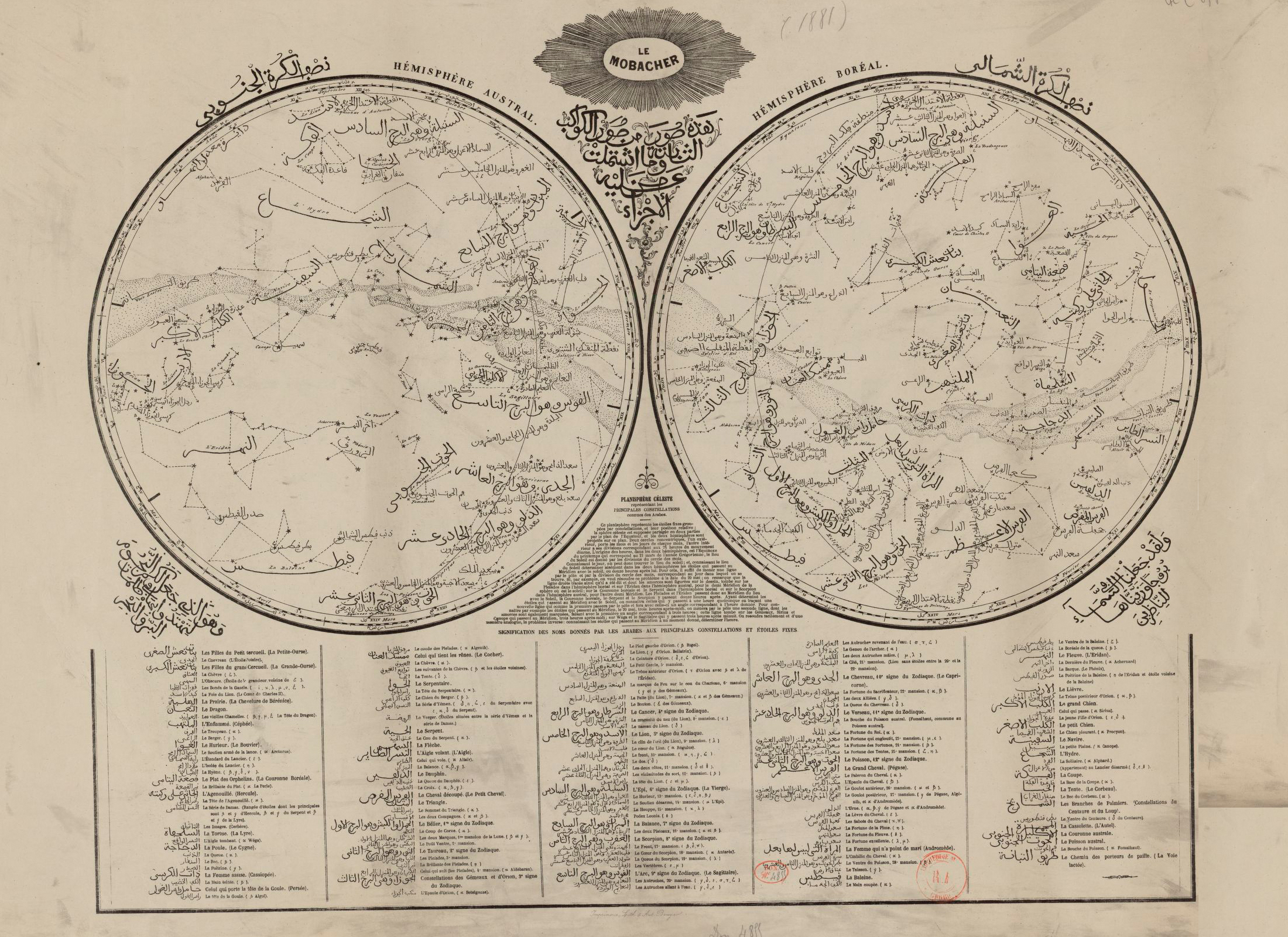 خريطة الافلاك الثابتة نشر في جريدة المبشر الناطقة بالعربية الثادرة بالجزائر سنة 1881